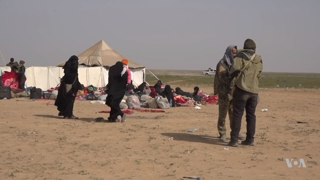 Femmes et enfants de l'Etat islamique dans le camp de réfugiés d'al-Hol, contrôlé par les Forces démocratiques syriennes, 11 mars 2019.